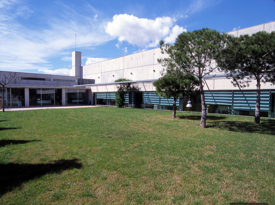 Fundació URV. Centre de Transferència de Tecnologia i Innovació